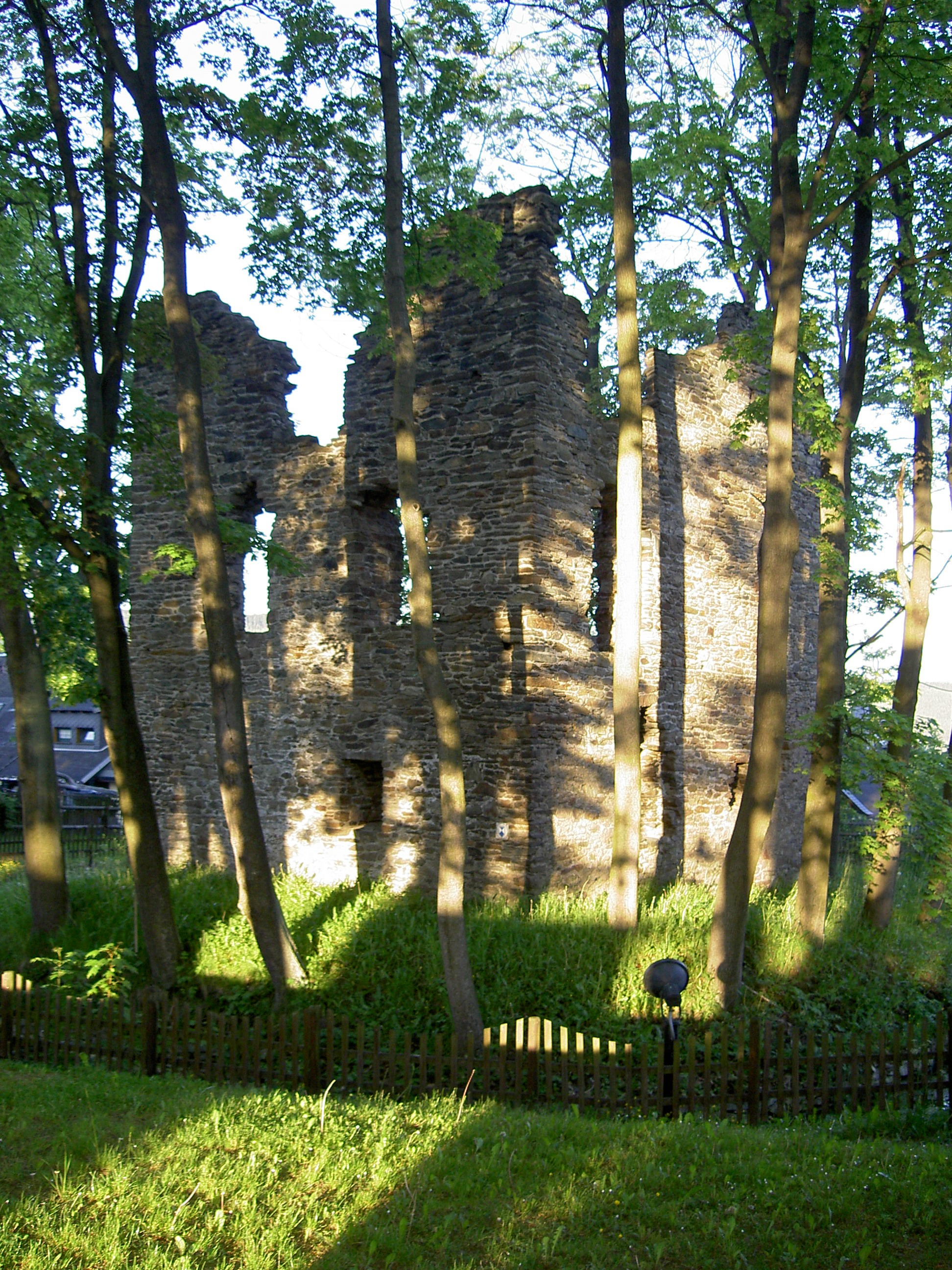 Die Jagdschlossruine, das Wahrzeichen von Breitenbrunn